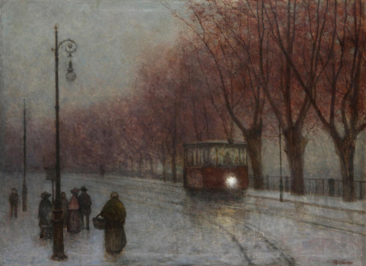 Ufer mit Straßenbahn